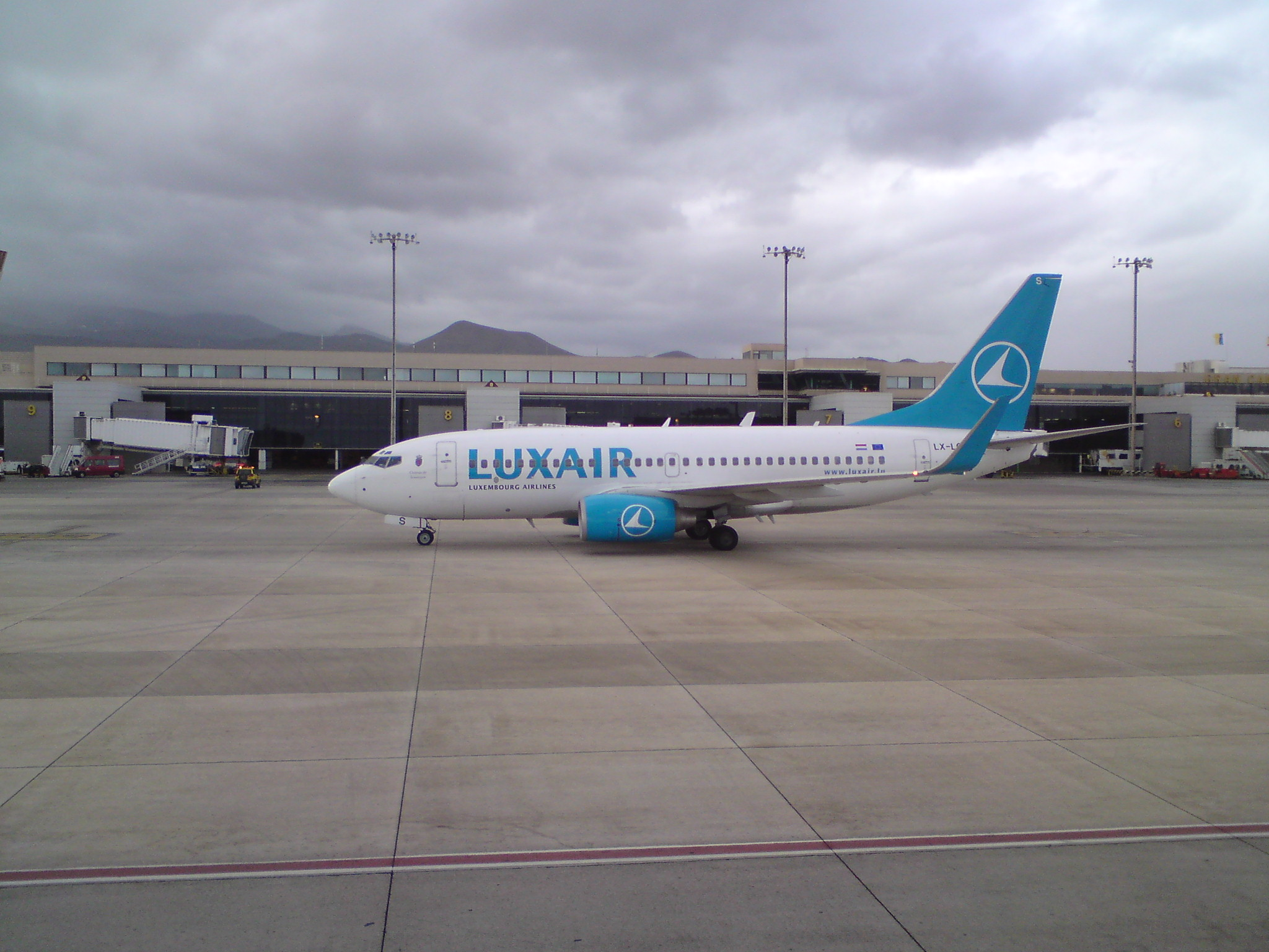 Eine Boeing 737 der Luxair in Gran Canaria.